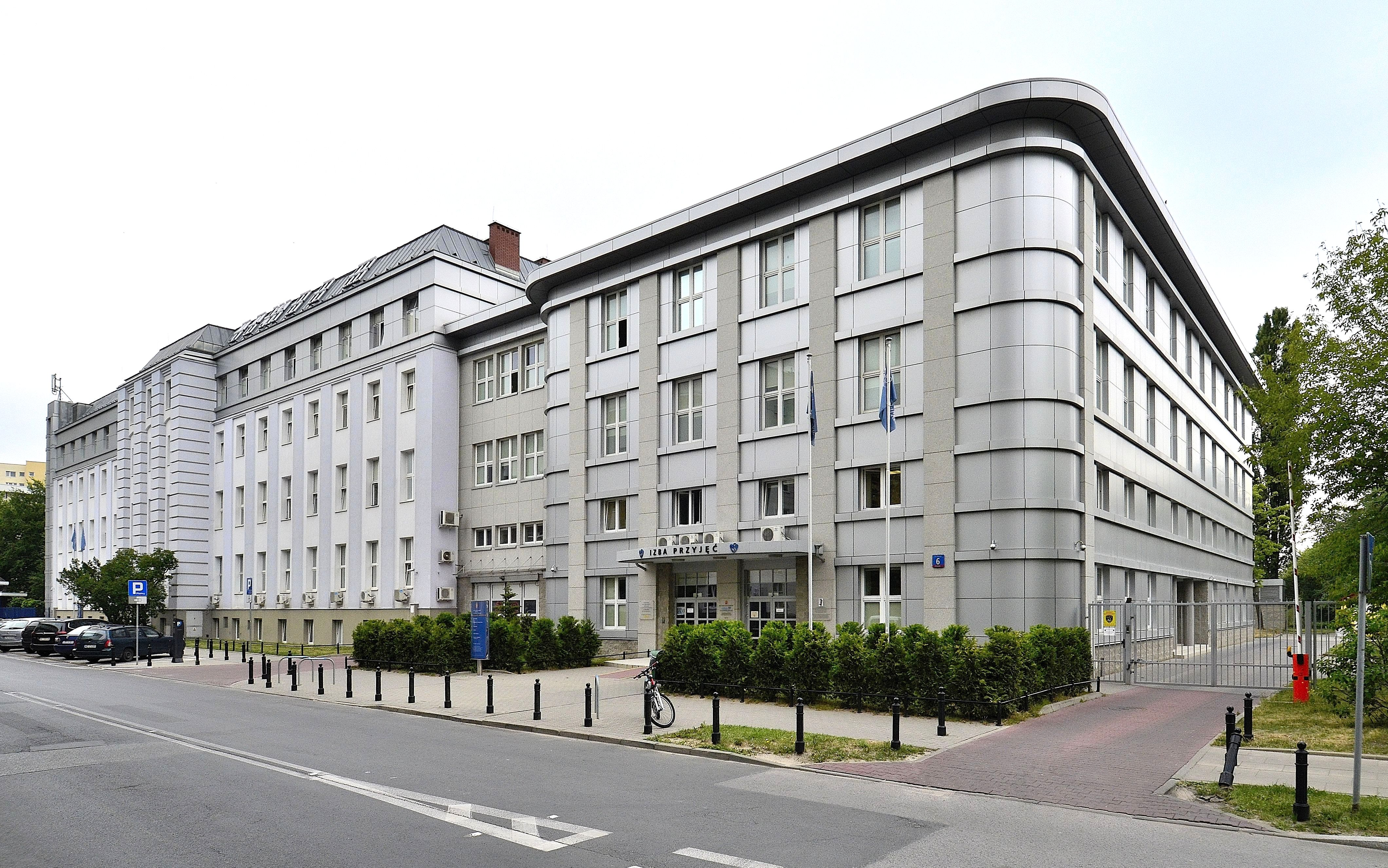 Szpital Specjalistyczny „Inflancka” im. Krysi Niżyńskiej „Zakurzonej”